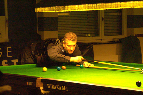 Tony "Tornado" Drago an den SwissOpen 2005